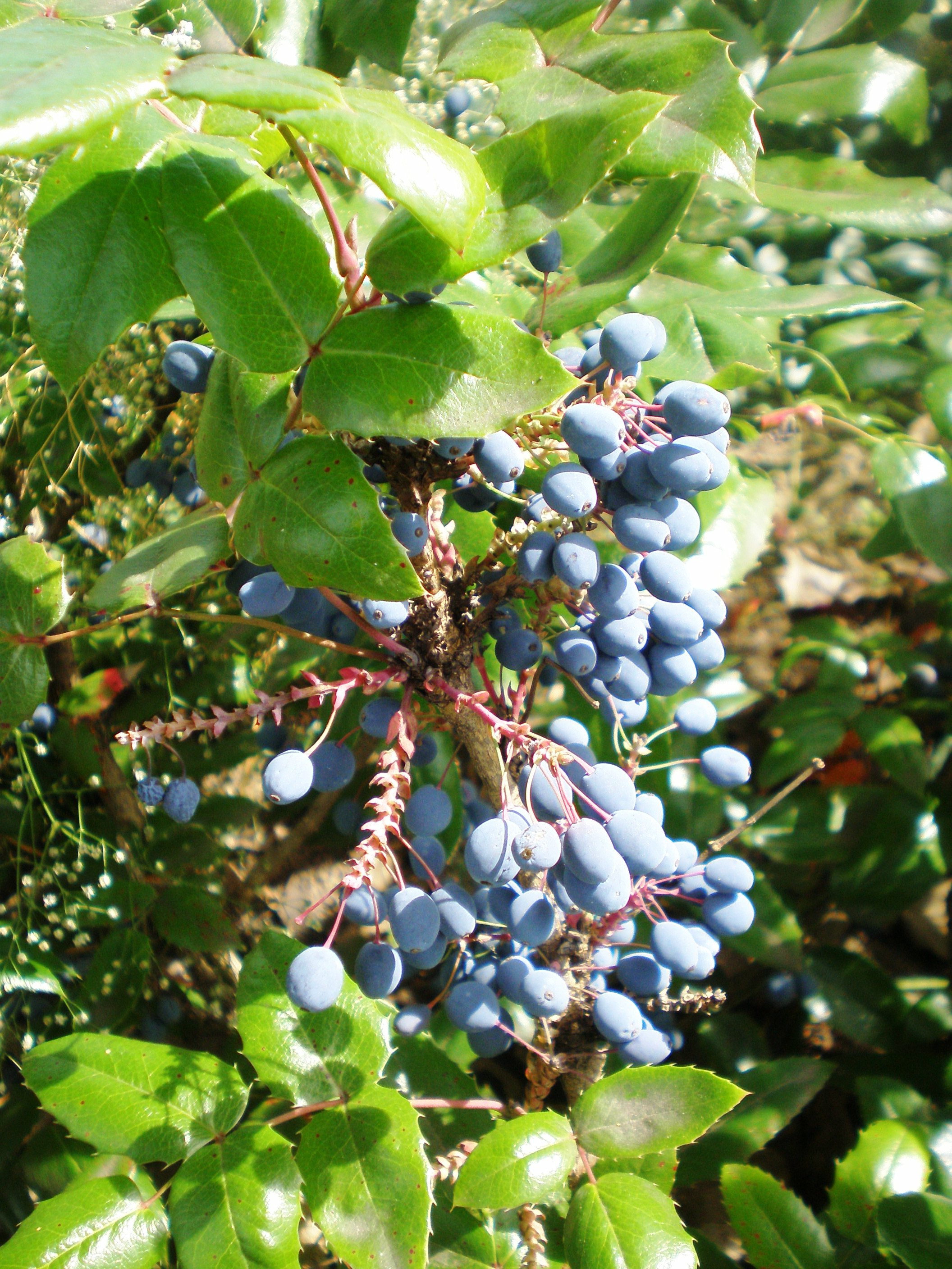 Mahonia aquifolium